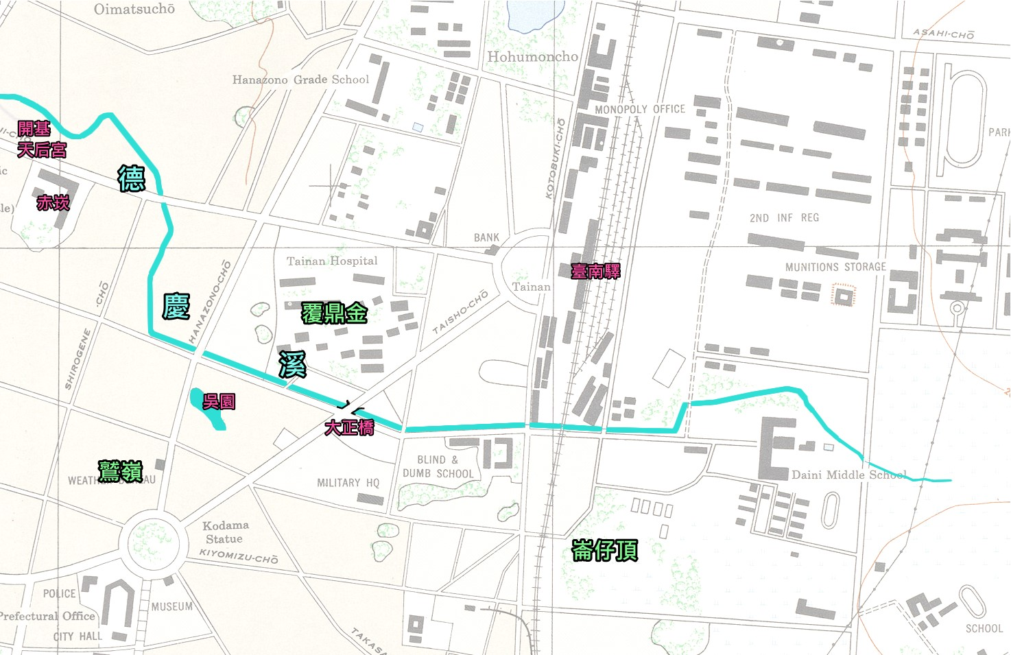 德慶溪流域圖。使用1940年代美軍繪製的臺南地圖[1]為底圖，將德慶溪上色，並加註台南府城的高地以及相關地名。